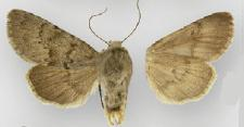 Lasionycta promulsa male